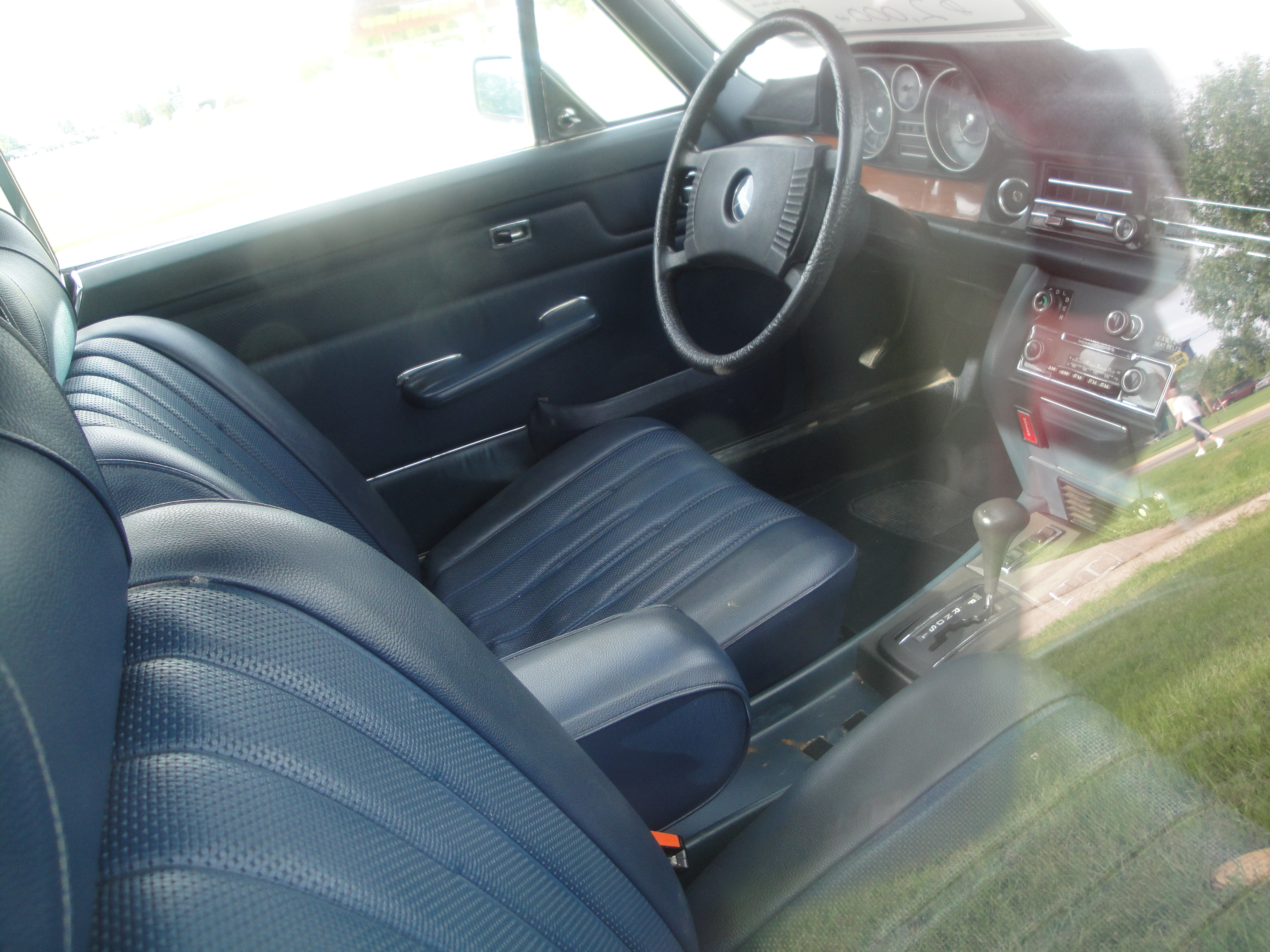 76 Mercedes 280C